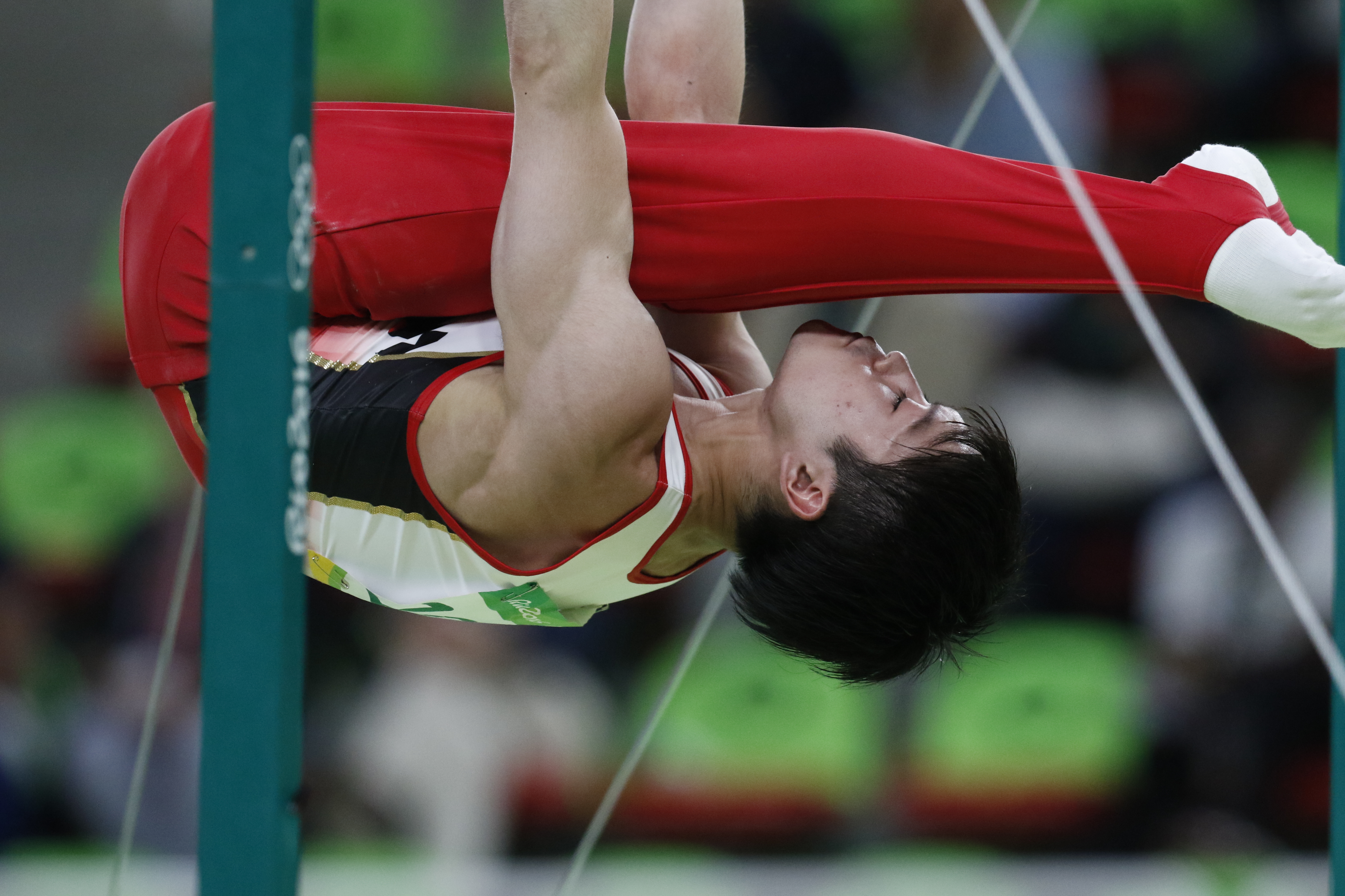 Rio de Janeiro - Kohei Uchimura durante exercício de solo em que o Japão levou medalha de ouro na ginástica artística por equipes no masculino nos Jogos Olímpicos Rio 2016 (Fernando Frazão/Agência Brasil)